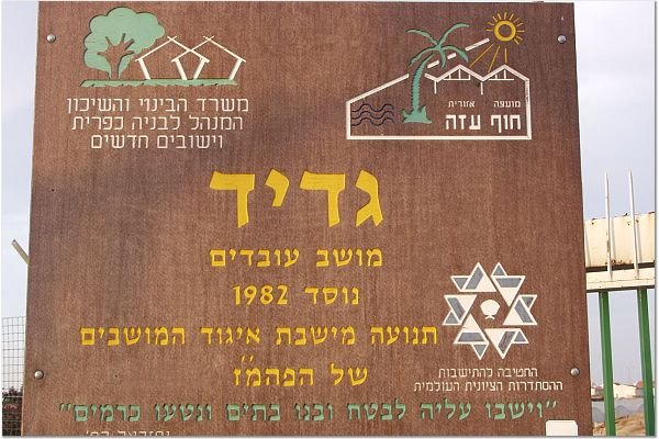 גדיד התמונות באדיבות קטיף.נט (קישור) אתר האינטרנט של גוש קטיף. צילם: מוטי סנדר.